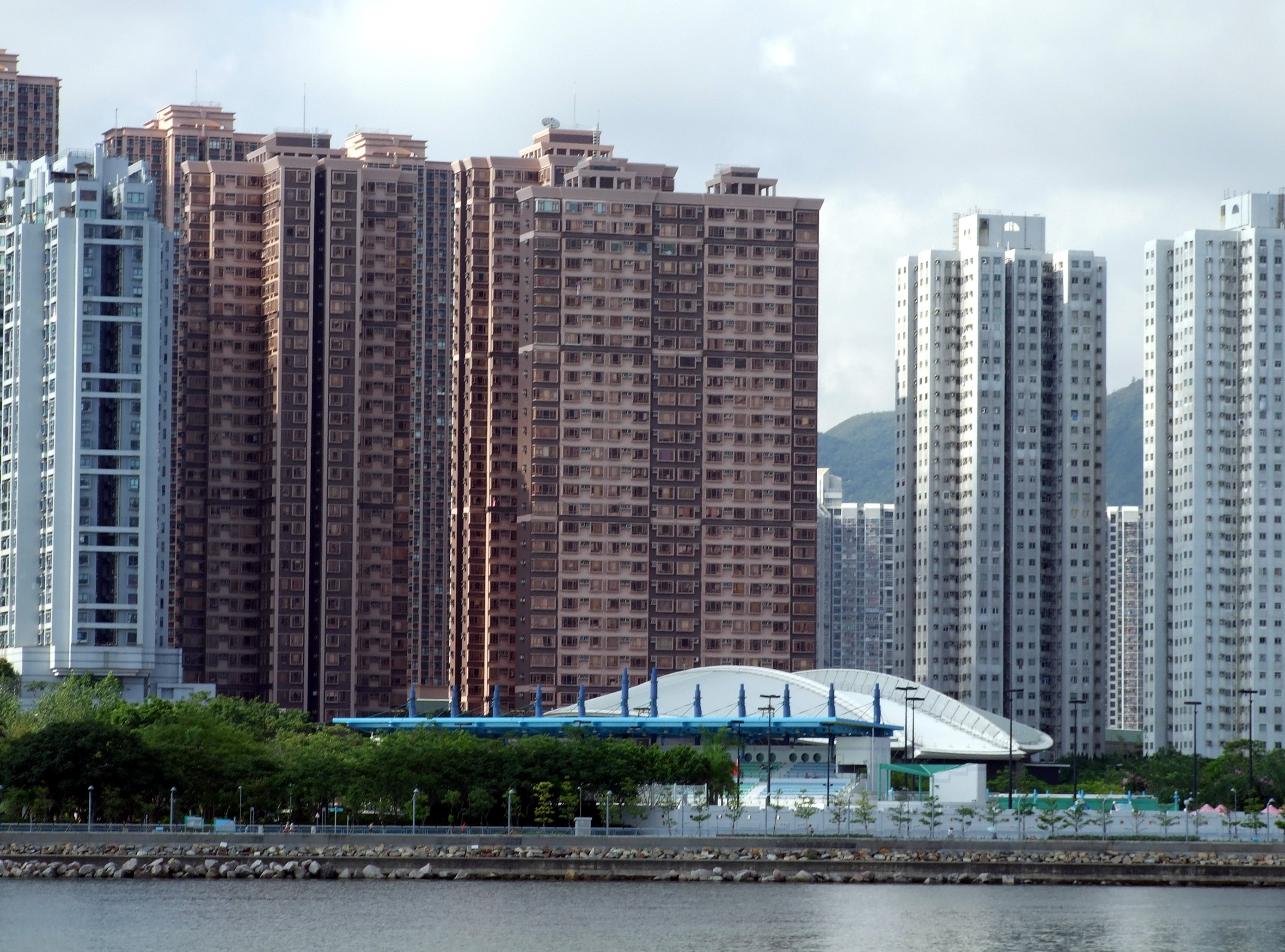 中文（香港）: 新港城海濤居